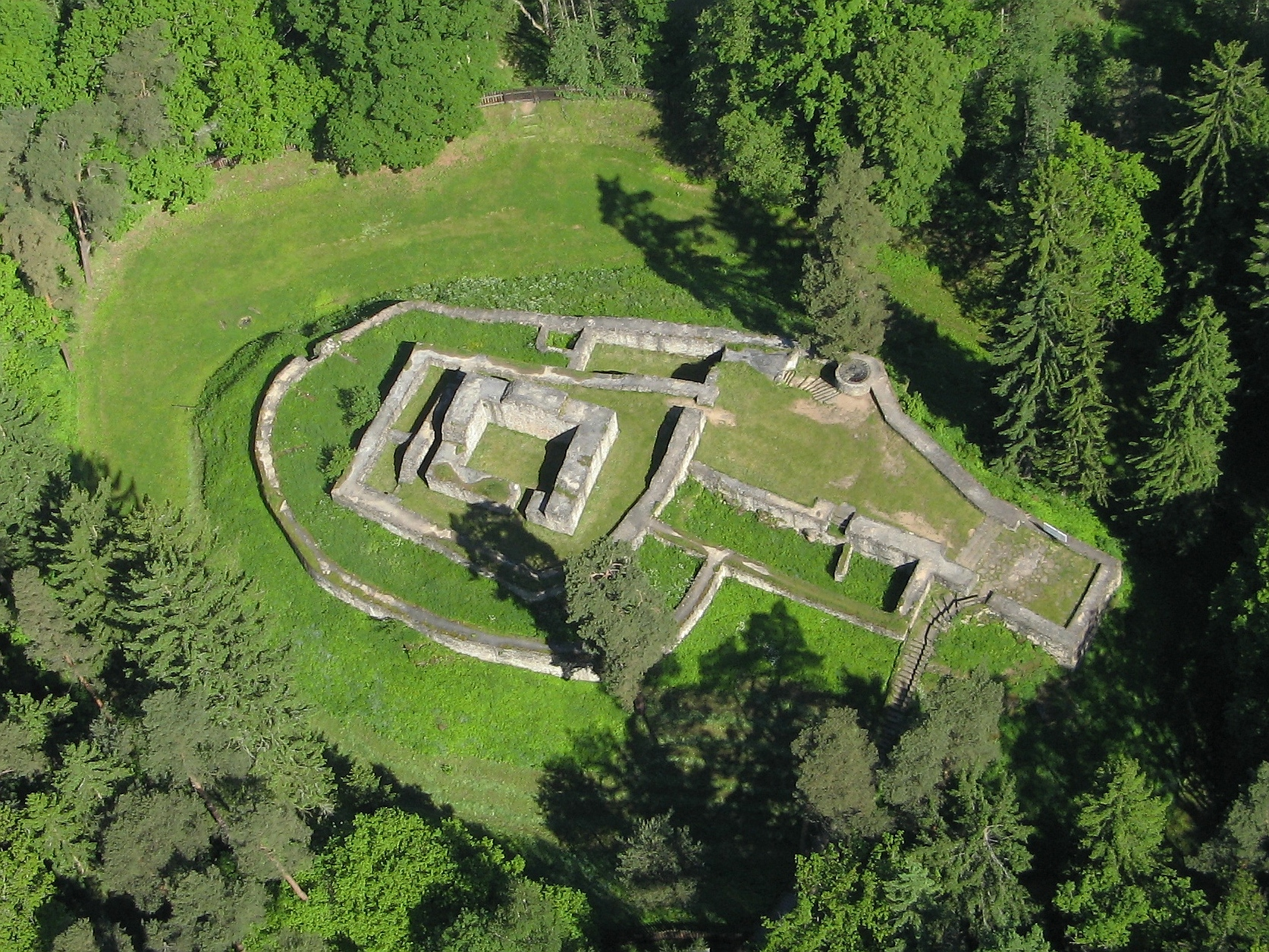 Hrad - hrádek Kozí Hrádek, zřícenina (Sezimovo Ústí), v lese S od obce, Sezimovo Ústí